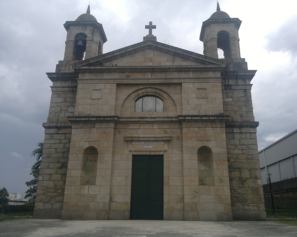 Igrexa de Santa María de Oza (Oza, A Coruña).